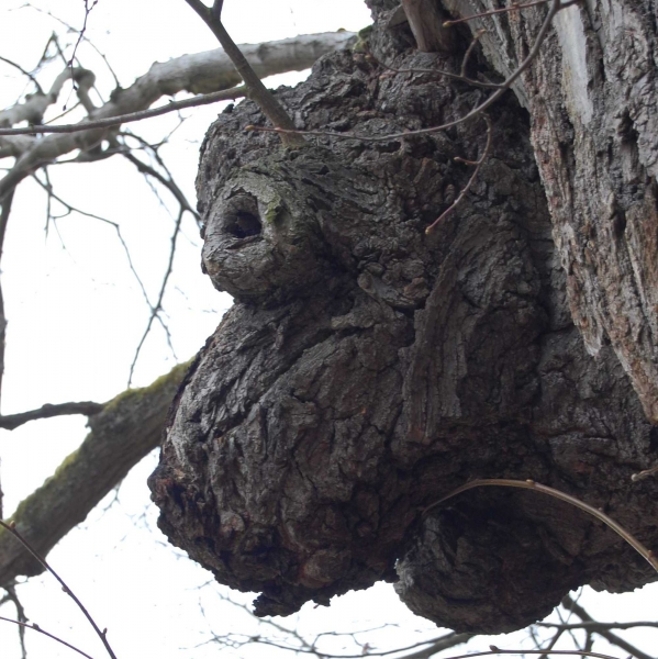 Detail zvláštního tvaru kmene lípy u Mrtole